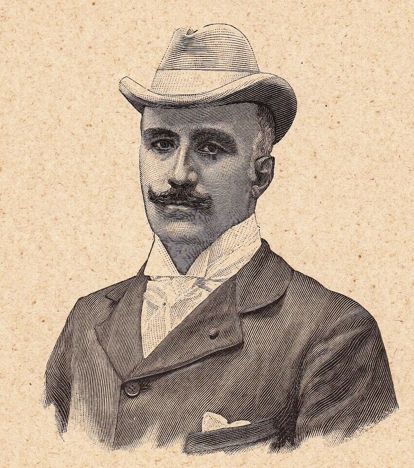 French painter Jean Béraud (1849-1935)